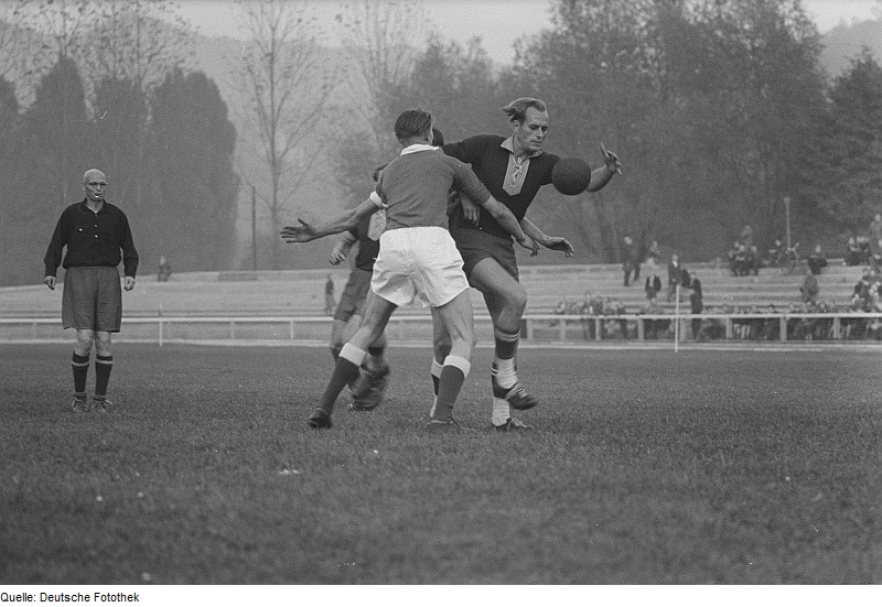 Original image description from the Deutsche Fotothek Handballspieler bei einem Spiel auf dem Feld